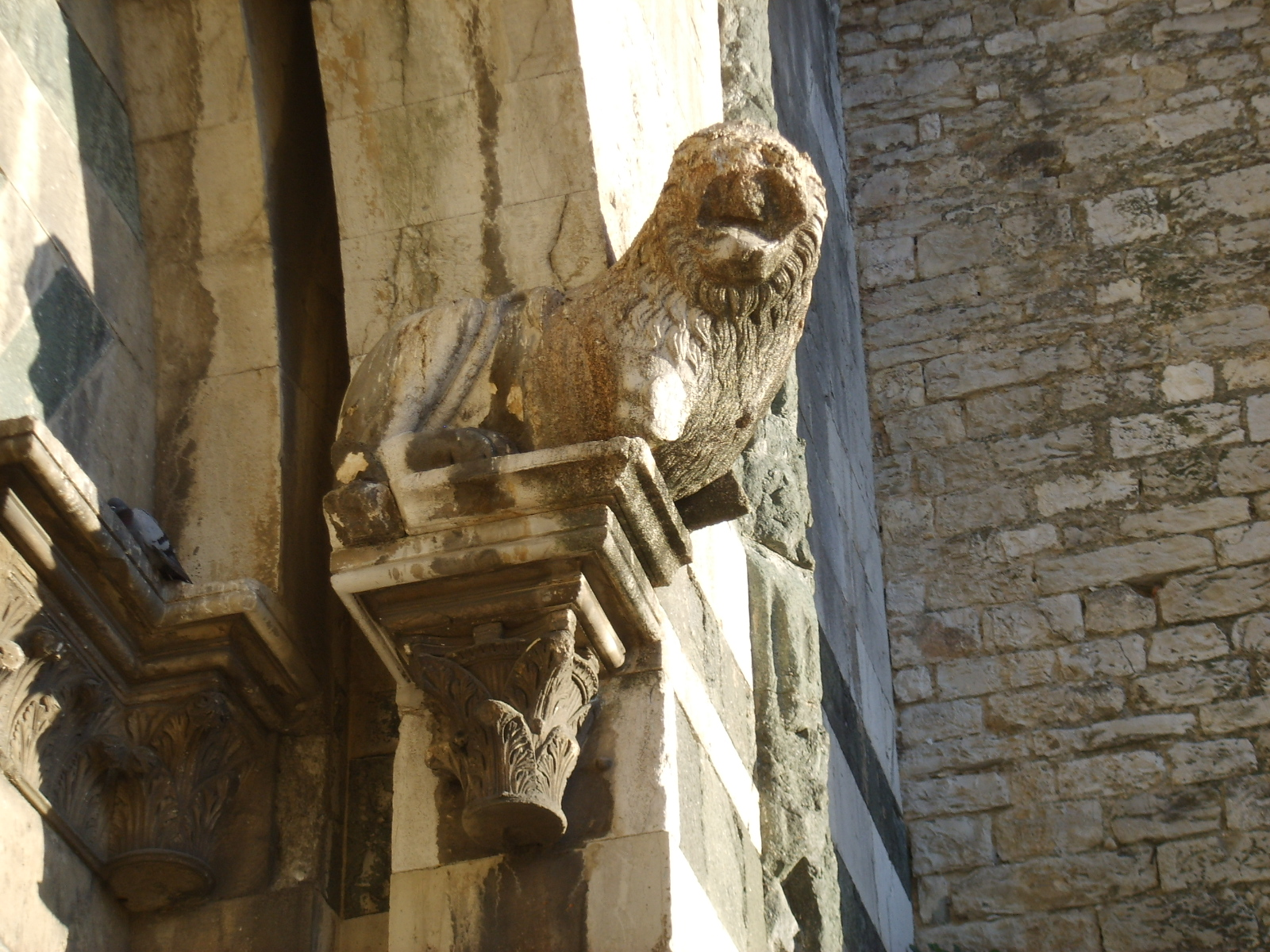 Castello dell'imperatore dettaglio